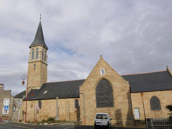 Eglise de St-Marc-le-Blanc (35)